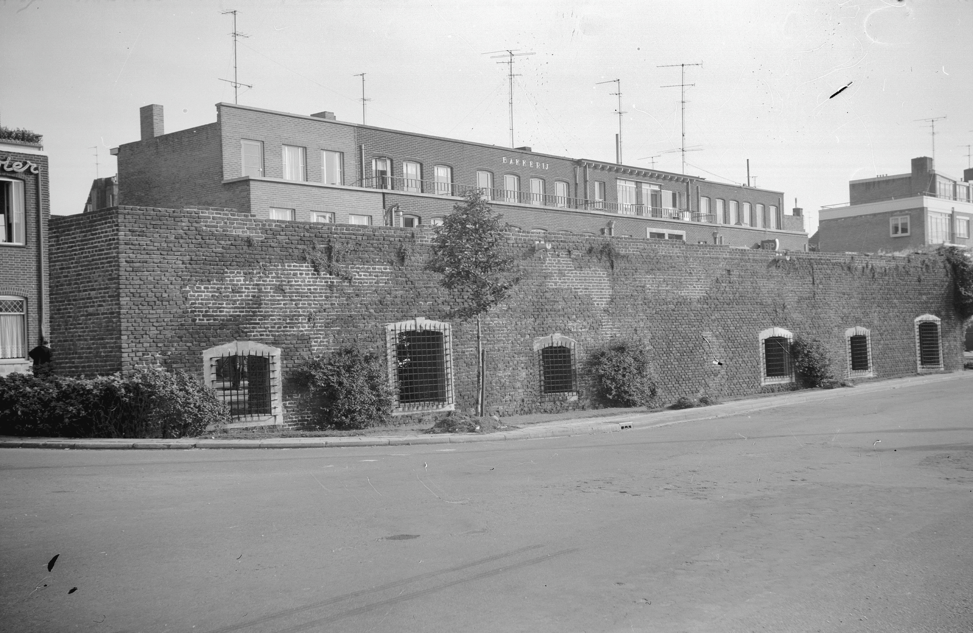 Havenkade, stadsmuur